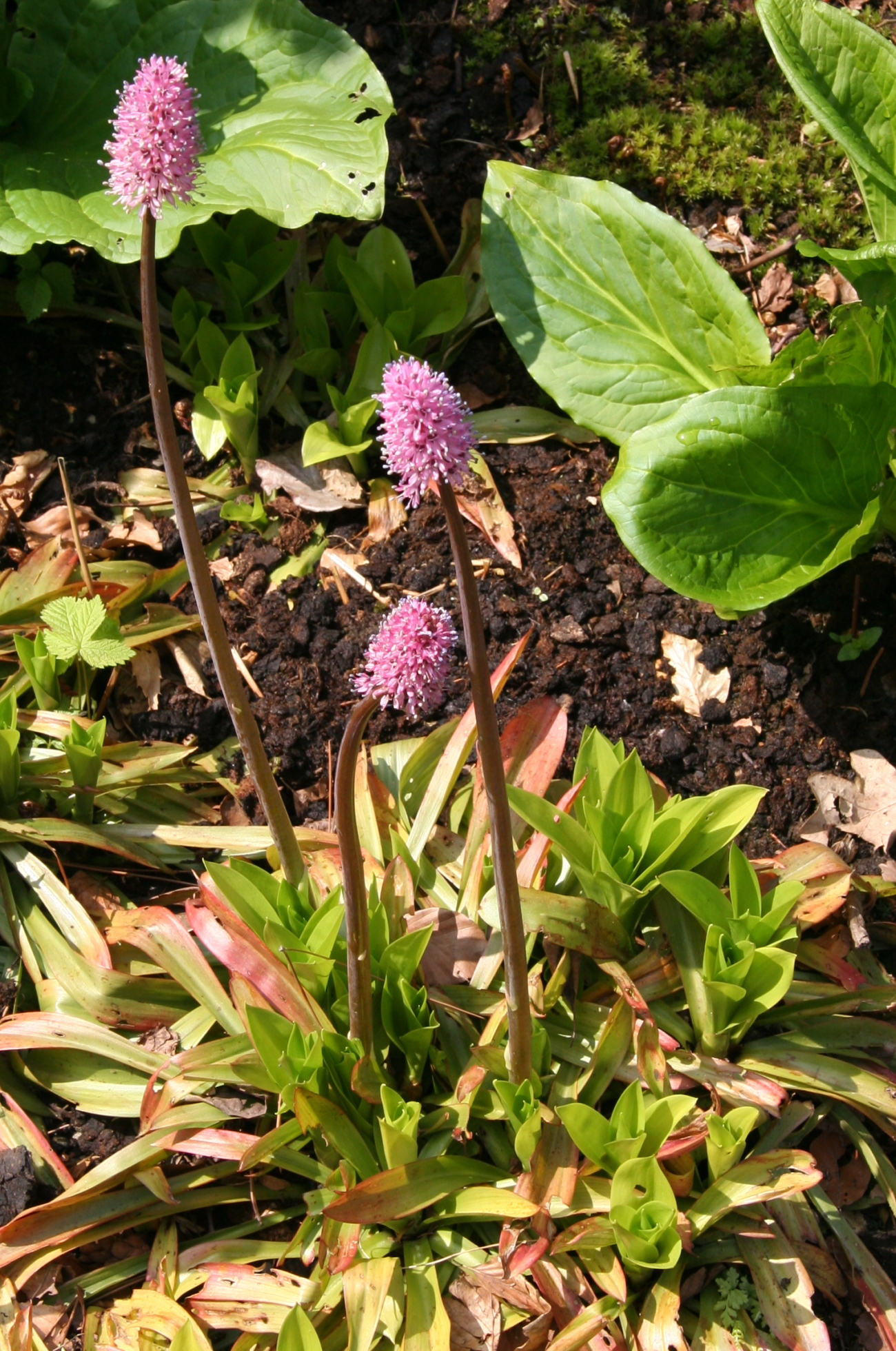 Helonias bullata im Botanischen Garten Dresden